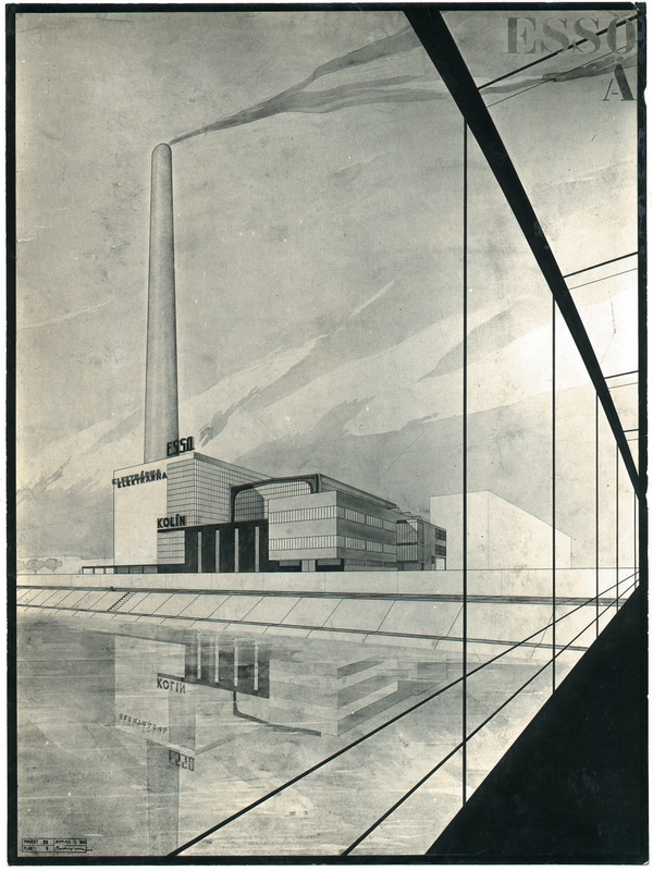 Perspektiva k zastavovacímu plánu (pohled z železničního mostu). Fotografie koláže 18x24 cm.